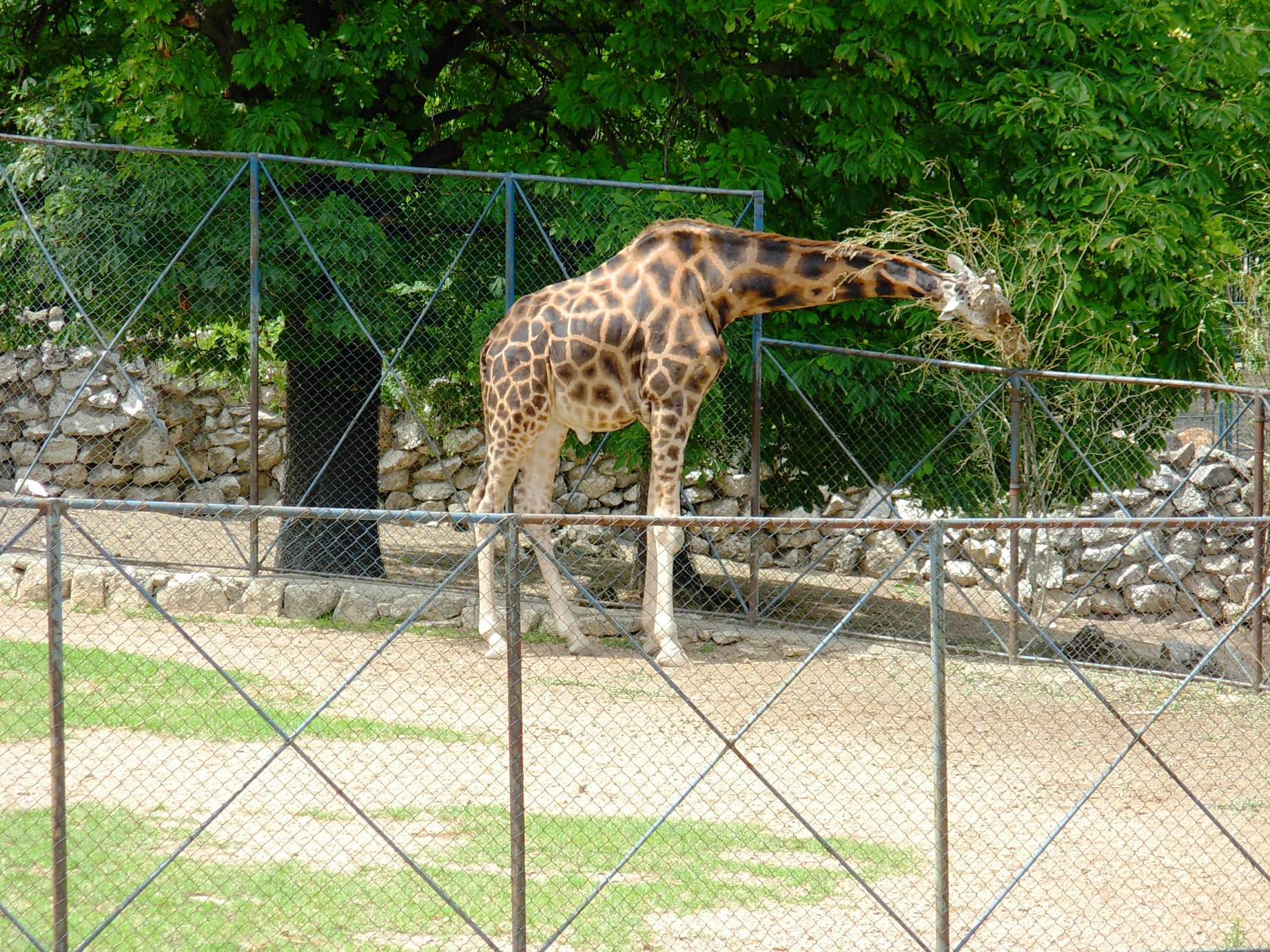 Žirafa u beogradskom ZOO vrtu, jul 2011.